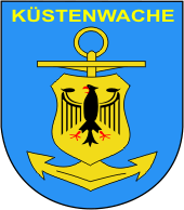 Wappen Küstenwache des Bundes